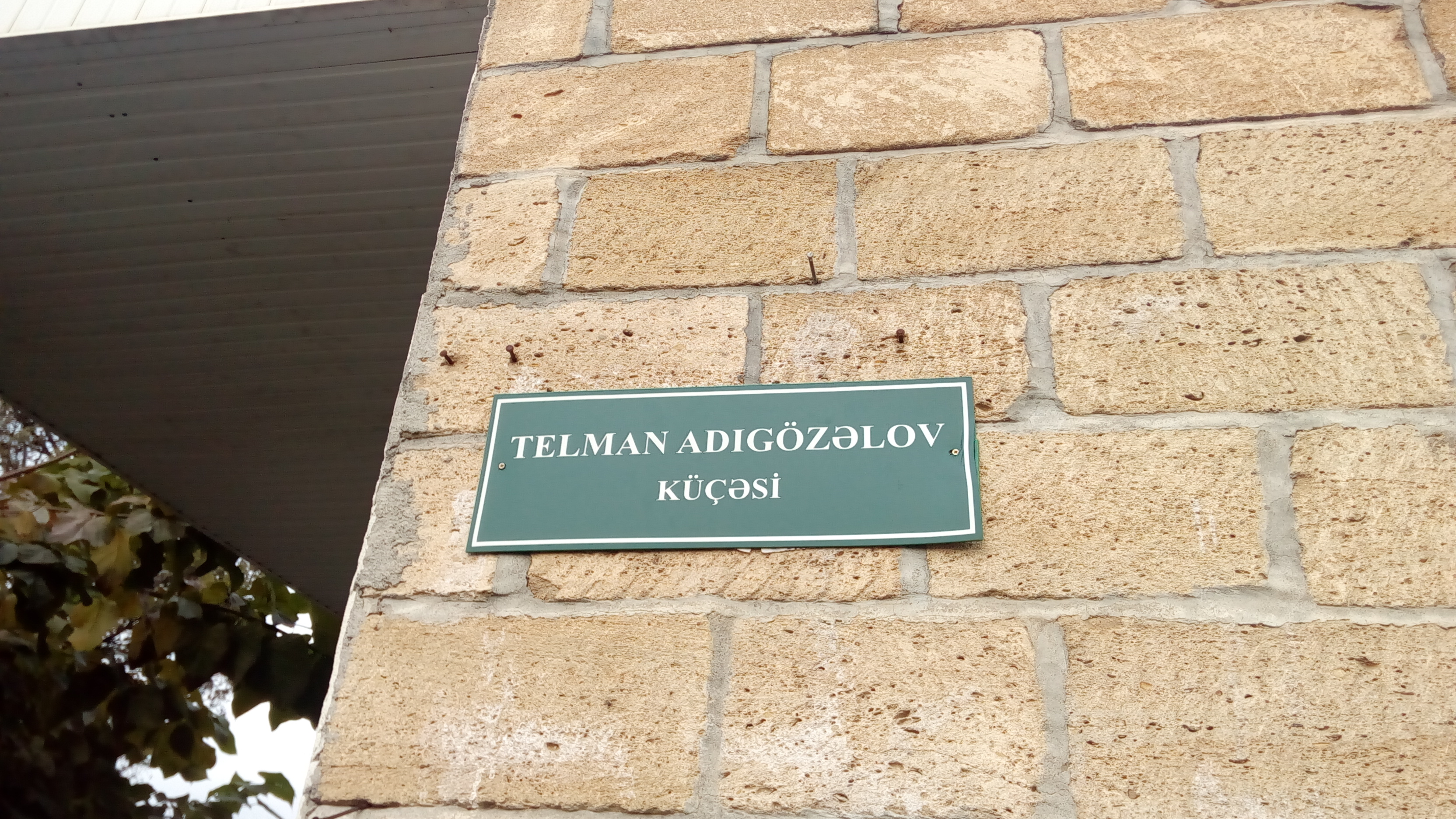 Balakən